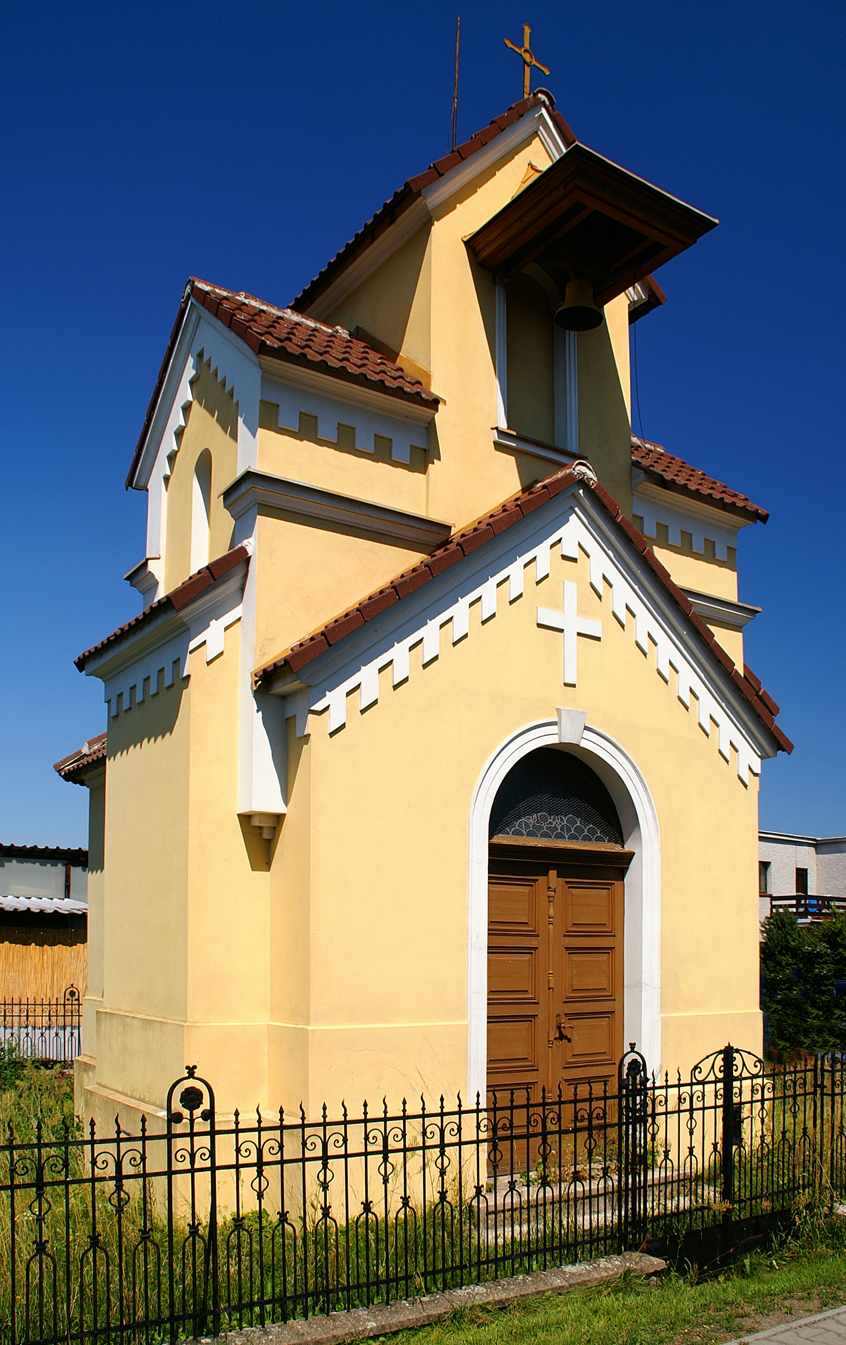 Blešno (HK), kaple Srdce Ježíšova